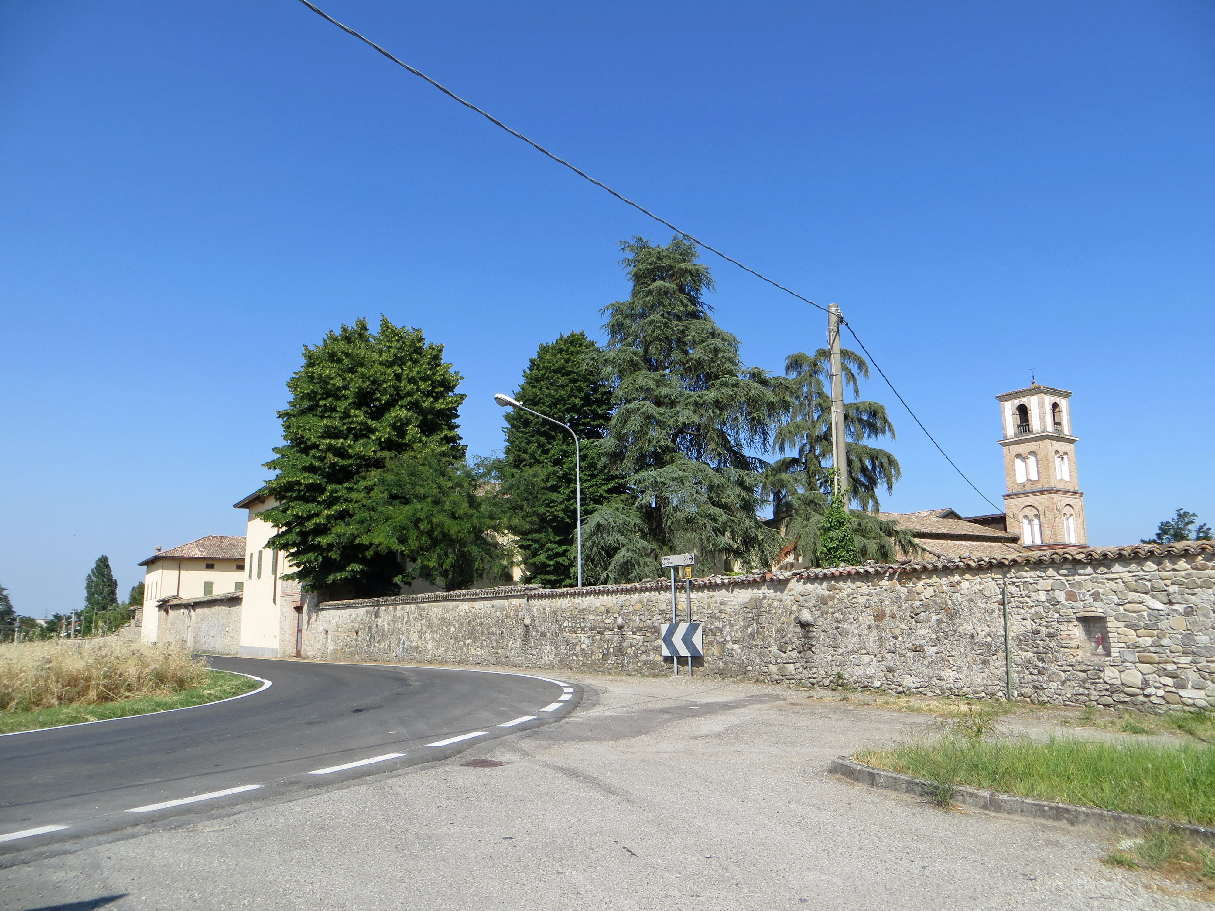 Badia di Santa Maria della Neve (Torrechiara, Langhirano) - mura del complesso